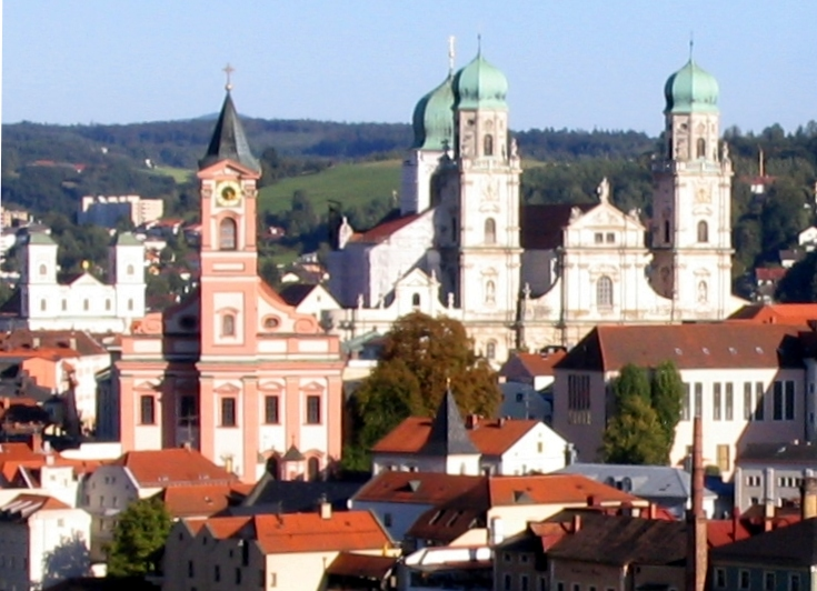 Stadtpfarrkirche St. Paul (links) und Dom St. Stephan (rechts im Hintergrund), Passau